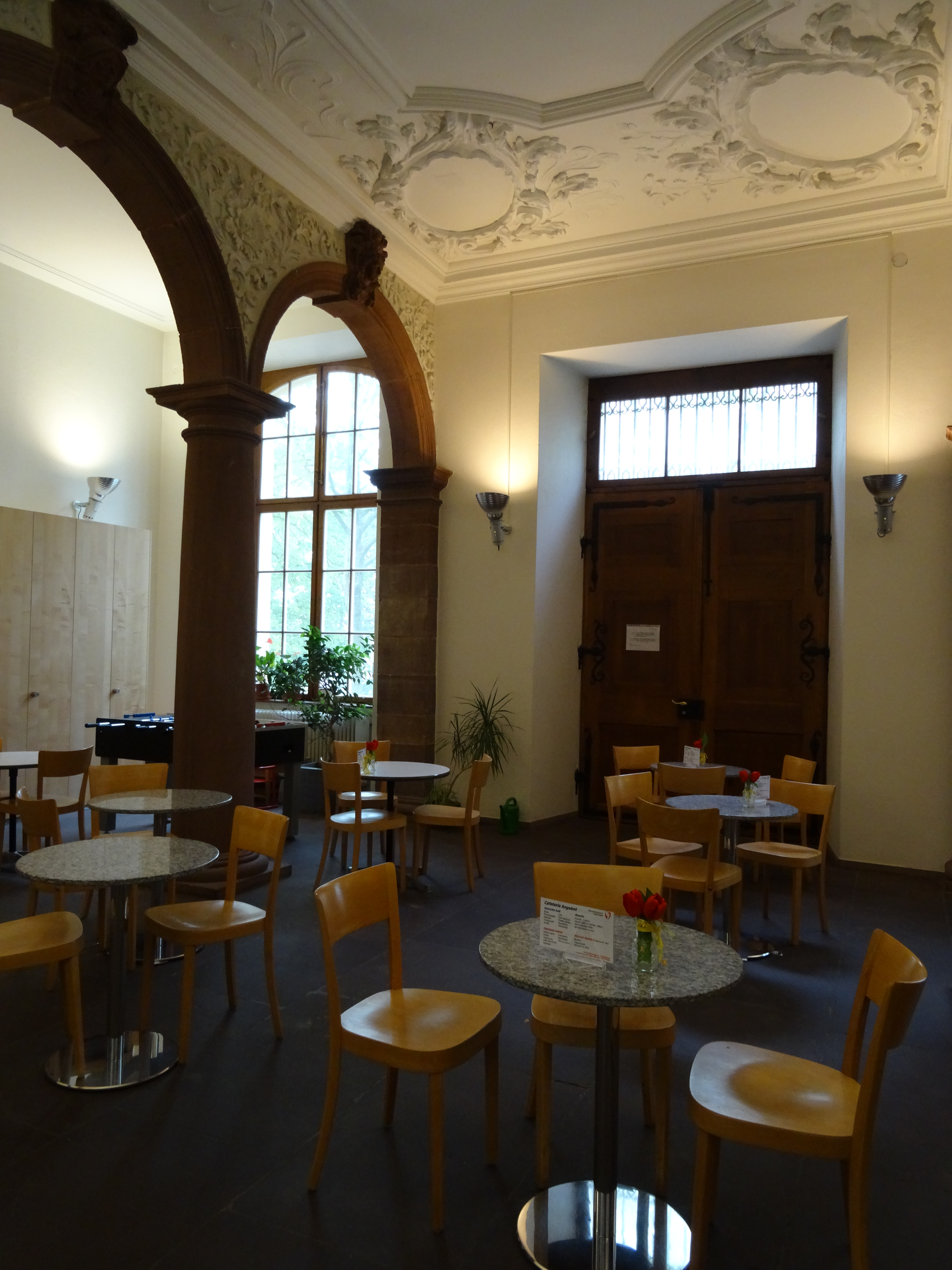 Eingangshalle des Markgräflerhofs an der Hebelstrasse 10 in Basel. Sie beherbert das Blutspendezentrum beider Basel.